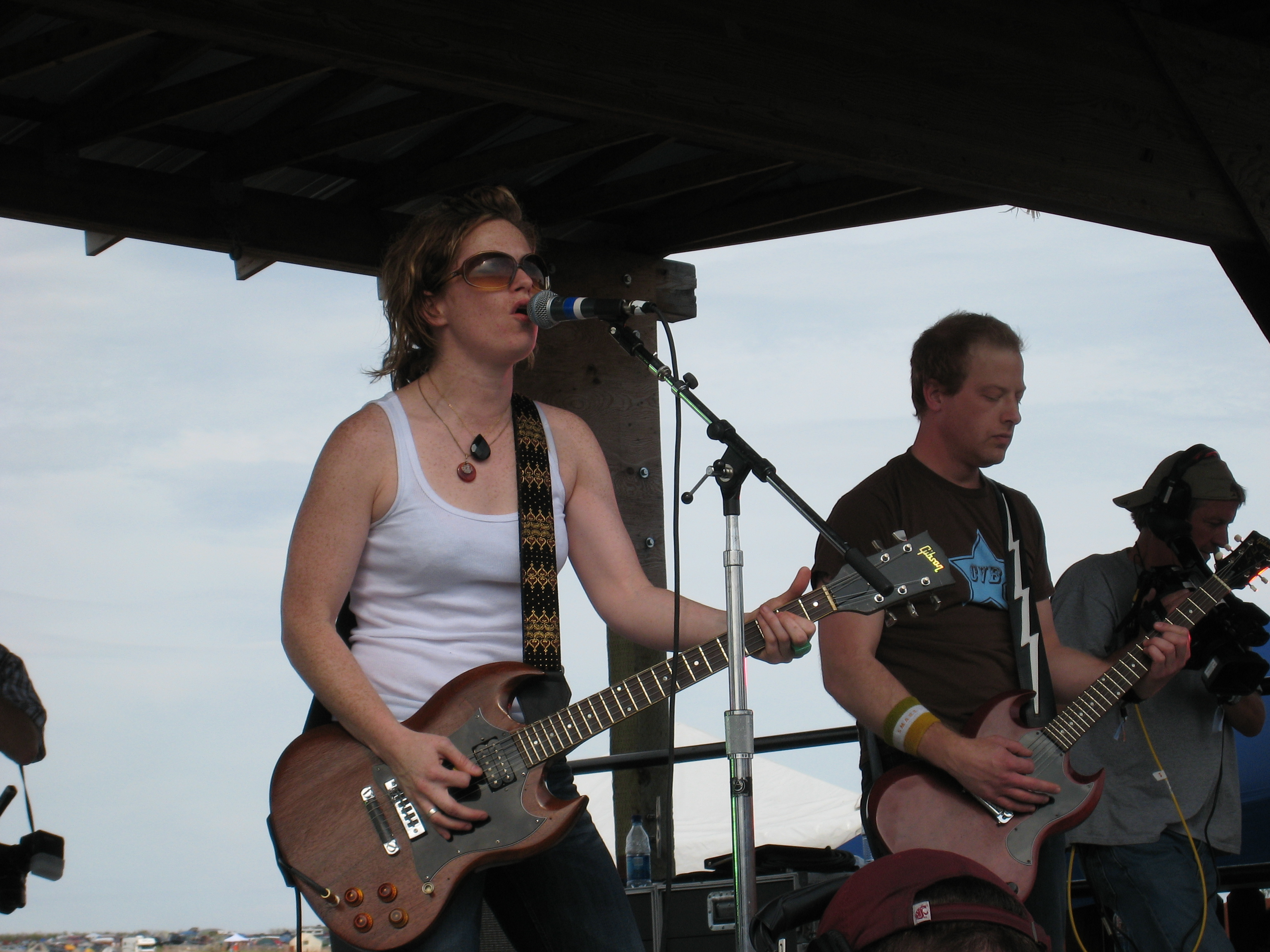 Visqueen